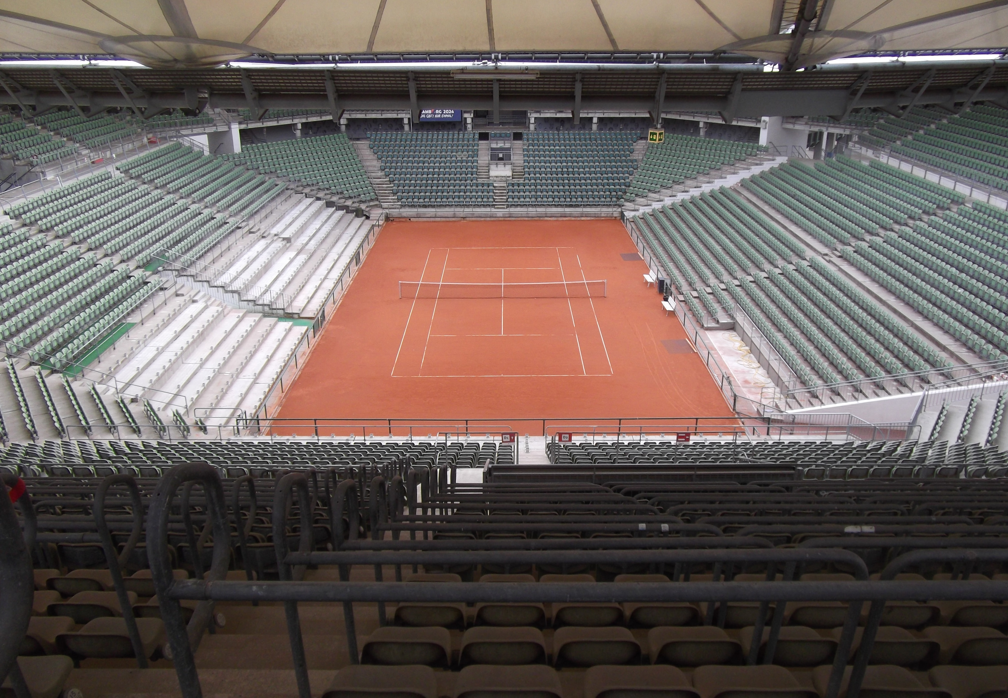 Hamburg, August 2015